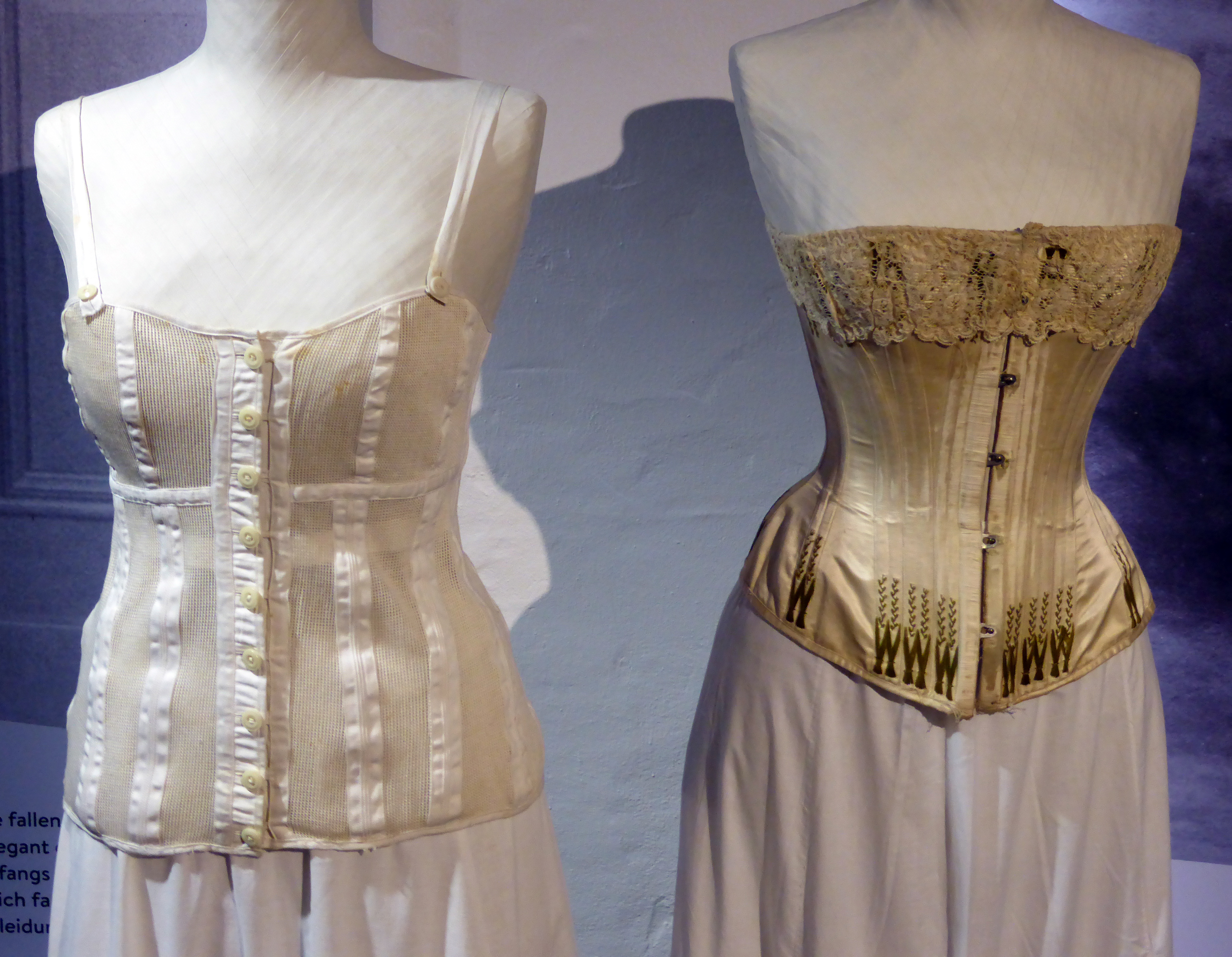 Sonderausstellung: Macht der Mode. Reformkorsett (links, um 1910), Korsett (rechts, um 1890) im Textilmuseum Cromford in Ratingen.